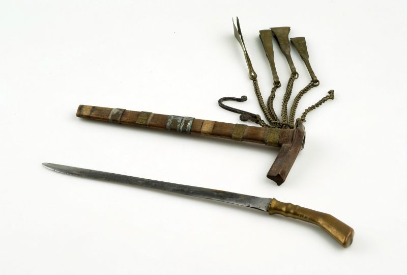 Dolk. Dolk met koperen greep en houten schede met daaraan koperen kettinkjes met baardtangetjes